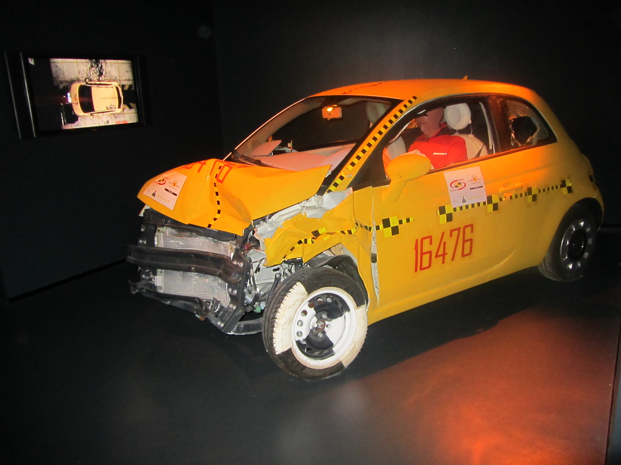 esposizione di una Fiat 500 sottoposta al crash test (5 stelle) presso il Museo Nazionale dell'Automobile di Torino